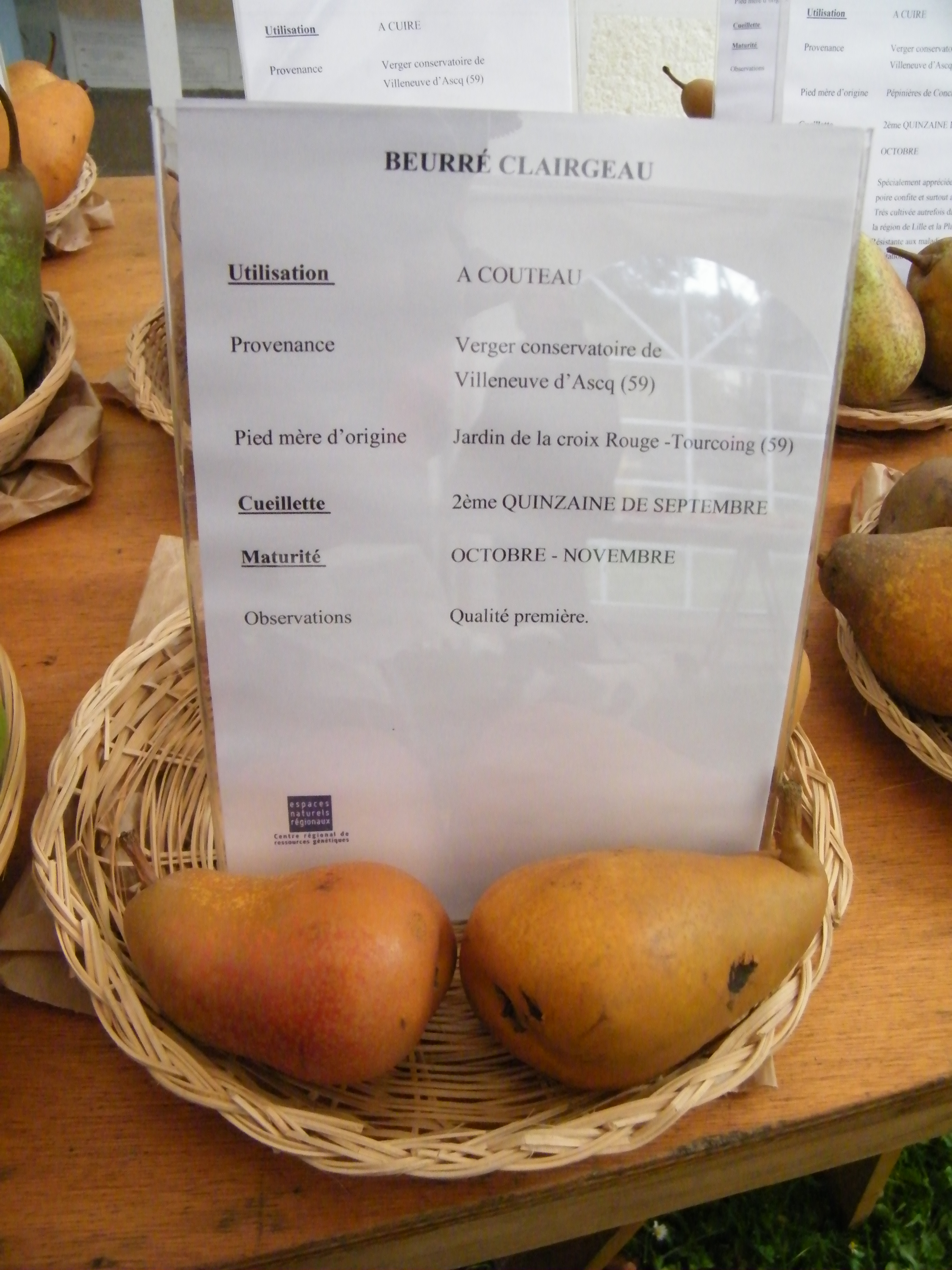 Beurré Clairgeau, Mons-Boubert, Somme, Fr, expo du 29-10-2017 (115)